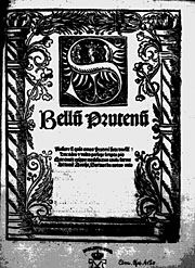 Тытульны аркуш выдання паэмы Яна Вісліцкага «Пруская вайна», (Кракаў, 1516 г.)